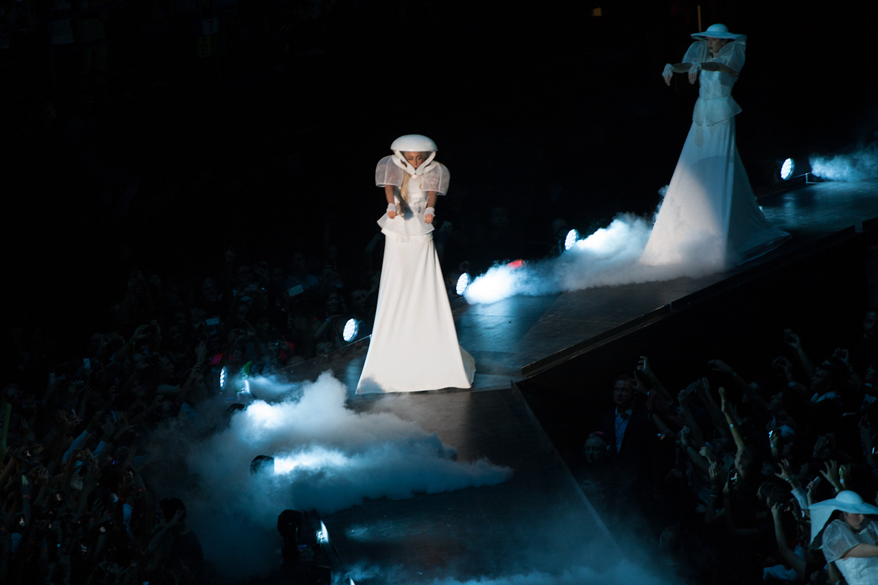 Lady Gaga cantando 'Bloody Mary' en su gira The Born This Way Ball, en Milán, Italia.